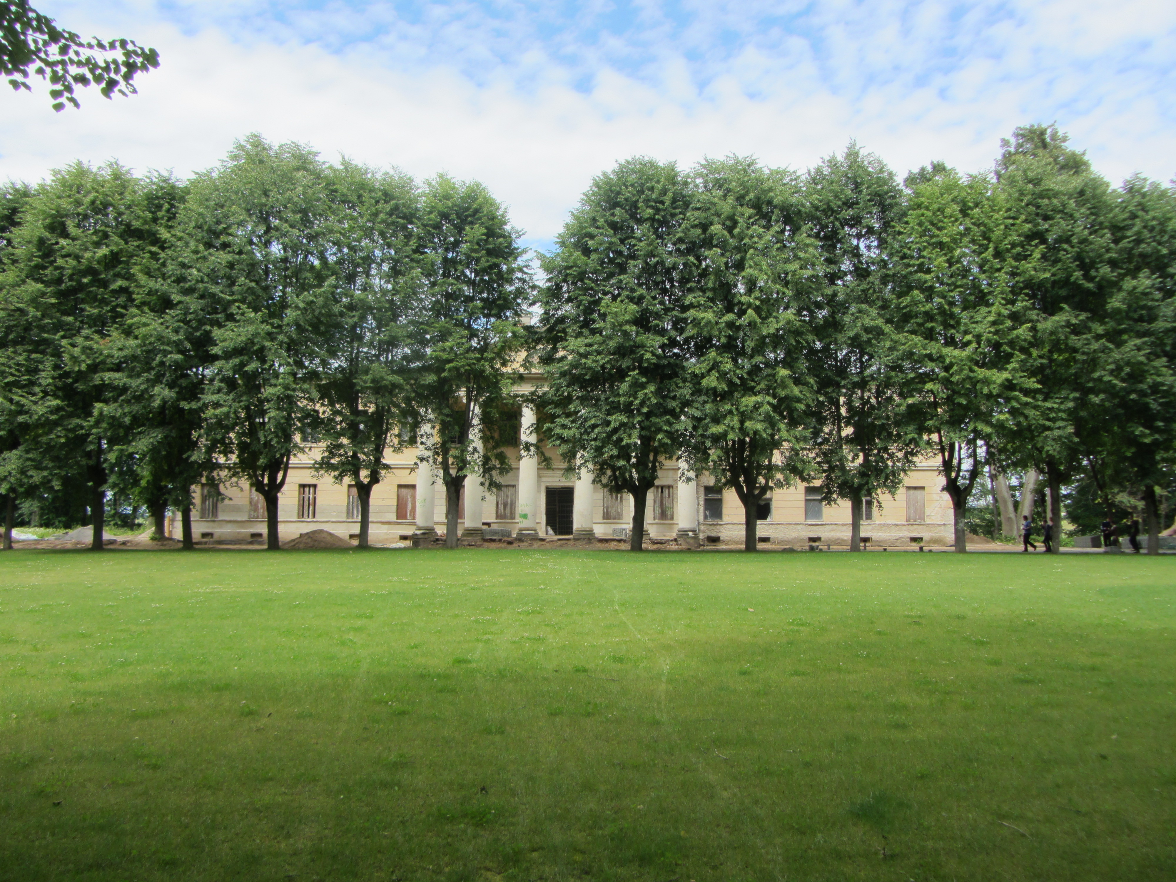 Bartkuškis 19159, Lithuania